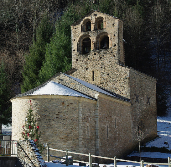 Datée du XIIème siècle, elle est à nef unique avec une abside en cul-de-four. Son clocher mur est percé de quatre arcades à chapiteaux ornés. .